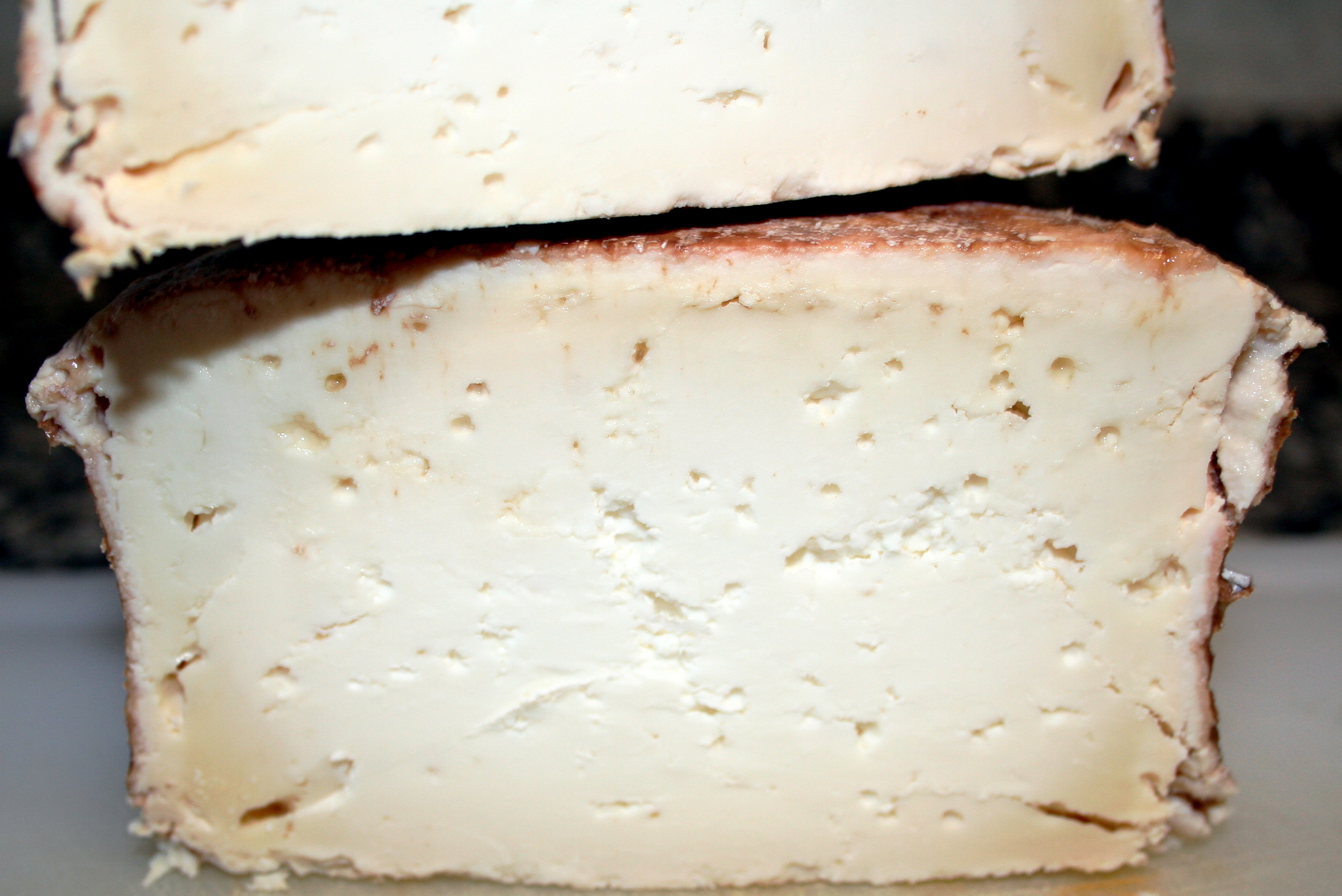 Interior del queso de la chivita